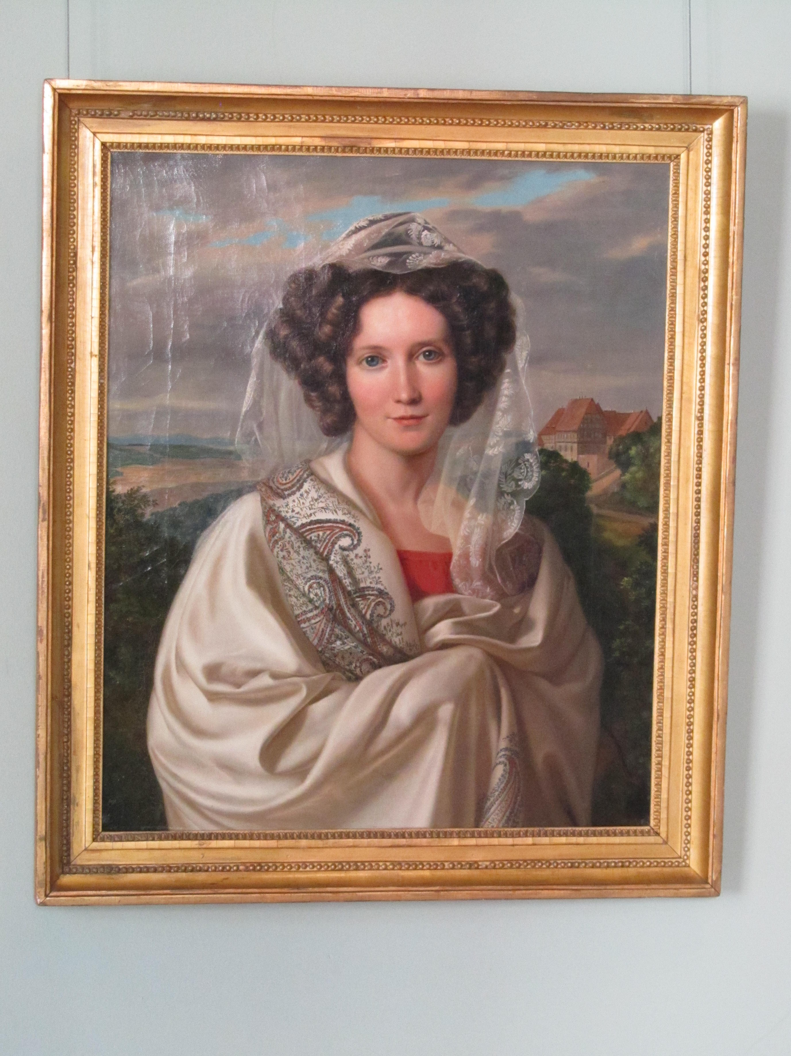 Gräfin Aeone von Wintzingerode, Carl Oesterley, um 1830, ausgestellt im Schlossmuseum in Weimar.